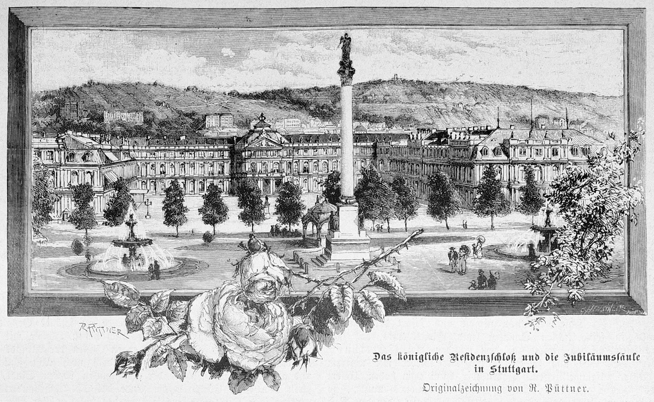 Bild aus Seite 245 in "Die Gartenlaube". Image from page 245 of journal Die Gartenlaube, 1887.